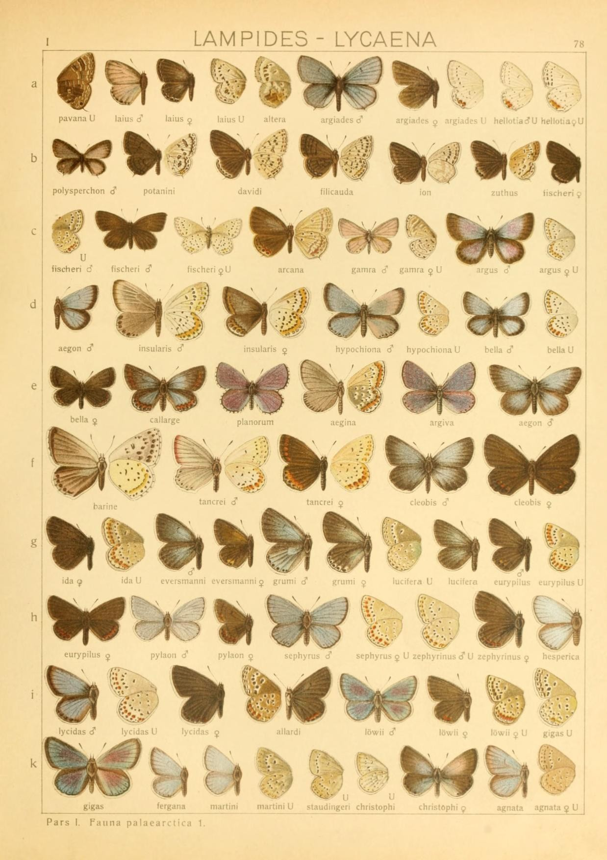 LAMPiDES- LYCAENA 78 ^'^•^ ^^^1^ polysperchon S potanini -i.Kks ,, :ui,'!,,Jrs i: hellntiacTU heliotiayU iuthas iischen pavana Ll lain- a lams r, lams U altera ai 'nnd^s,., ,'idi area ^ u fischeri d fischeri .f fischerioU r aegon d" insularis c? insularis ^ hypochiona .? hypochiona U bella d" bella U planorum tancrei d ^^ "'^•'-' tancrei d tancrei o cleobis d' J^obis ^ barine ^^^ ^^ tii.mrii L\ crMii.ii'p.i j eurypilus n pylaoii d' pylaon 5 sephynis cT sephyrus 5 U zephyrinus c? U zephyrinus 9 hesperii. glg«S fergana martini martini U staudingeri christophi christophi y agnata agnata $ Pars I. Fauna palacarc